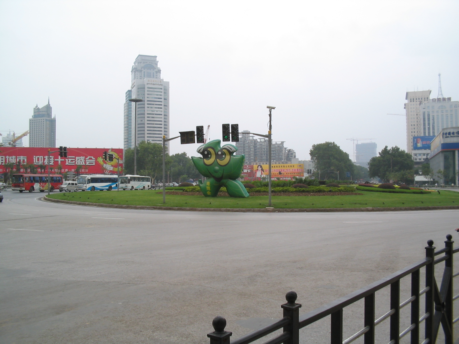 南京鼓楼广场，我自己(Tianxiaozhang)于2005年7月20日拍摄